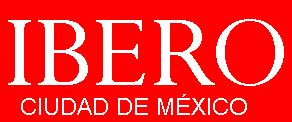 IBERO Ciudad de México